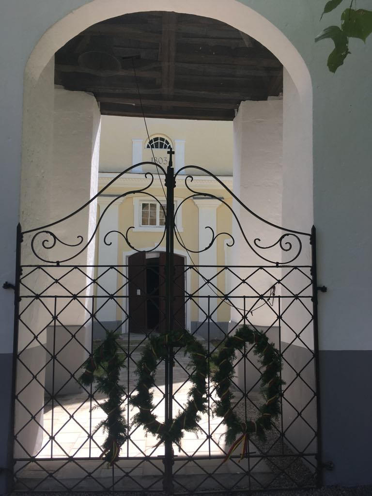 Palėvenėlės bažnyčia